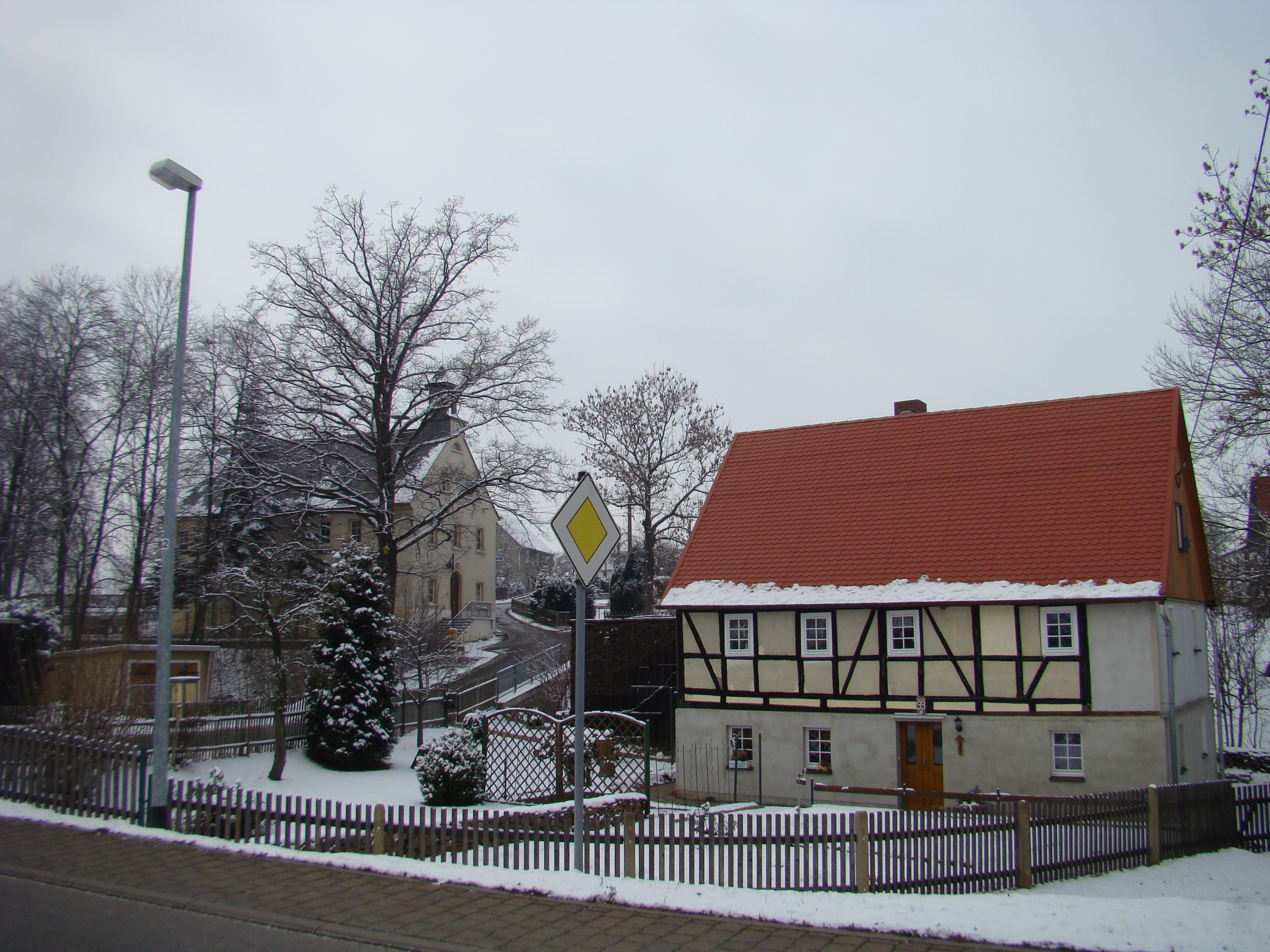 Mobendorf, schönes traditionelles Wohnhaus mit der alten Dorfschule, der Wirkungsstätte von Richard Witzsch, im Hintergrund